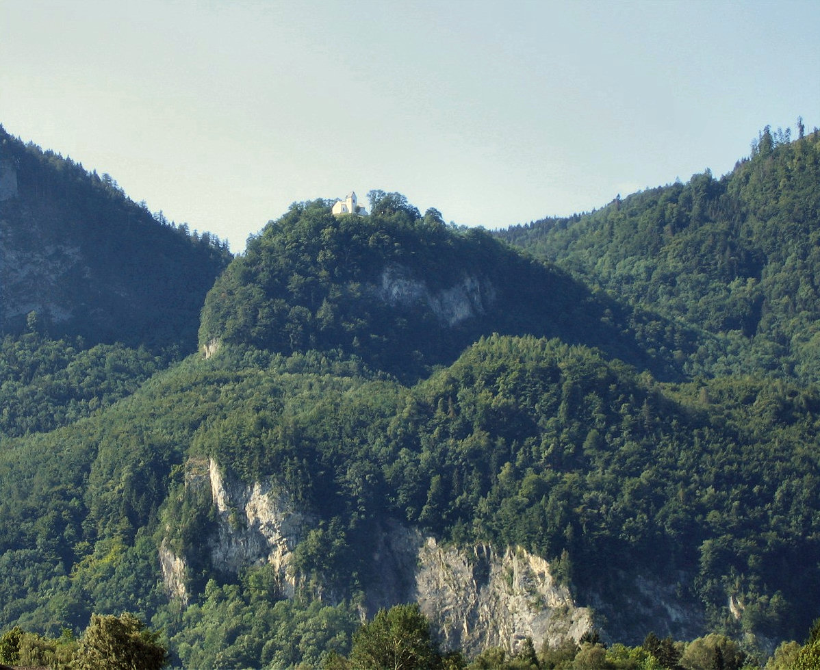 Petersberg von Flintsbach aus gesehen